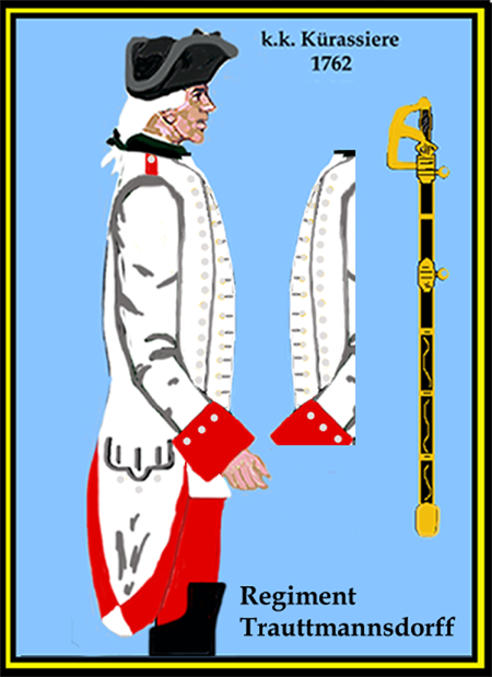 Österreichisches Kürassier-Regiment „Trauttmannsdorff“ (Aus: L.& F. Funcken - „L'Uniforme et les Armes des soldats de la guerre en dentelle II“) Castermann (Tournai 1976)